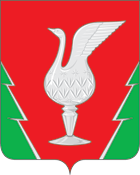 Герб Гусь-Хрустального района, Владимирская область